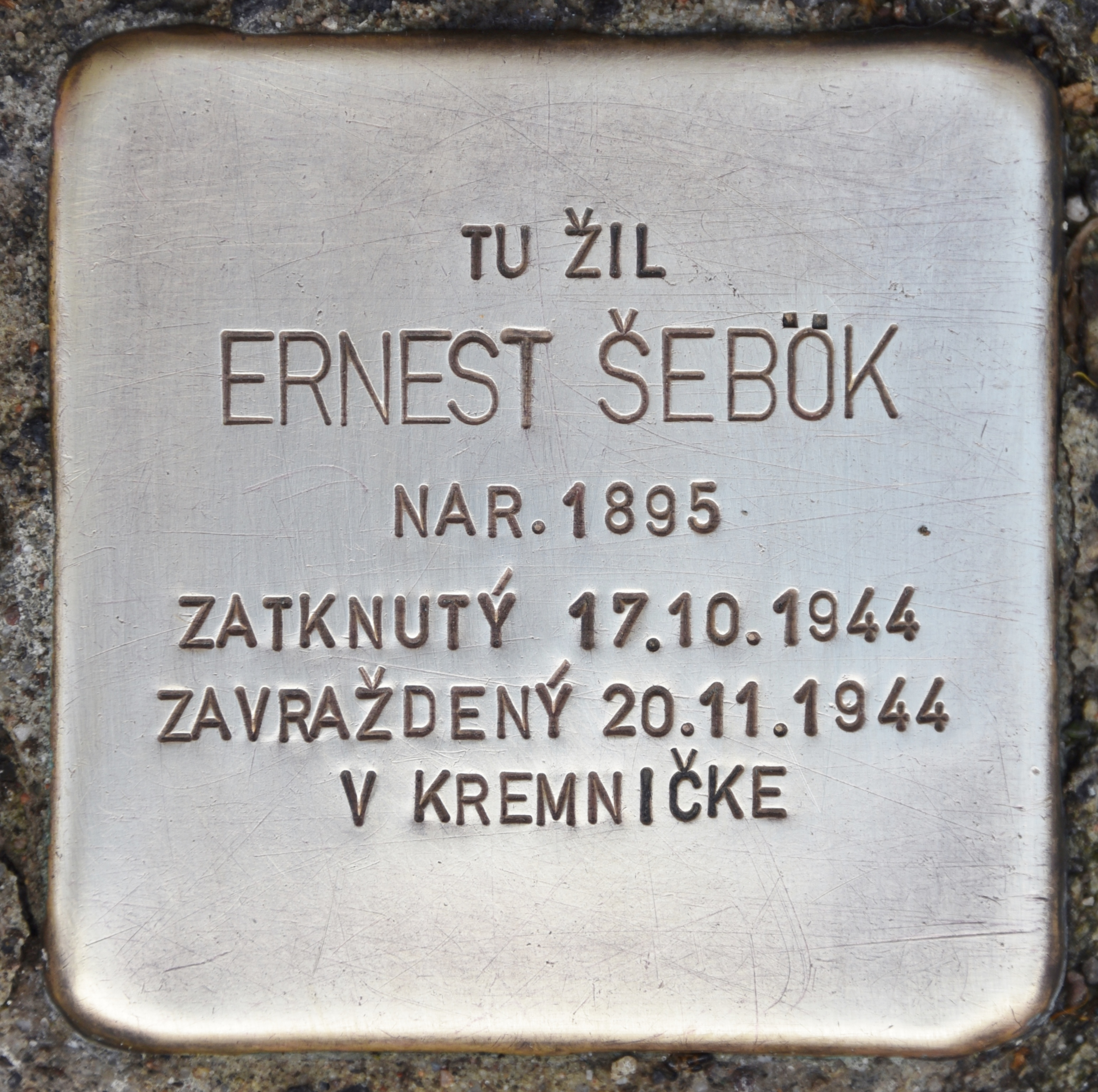 Stolperstein für Ernest Sebök